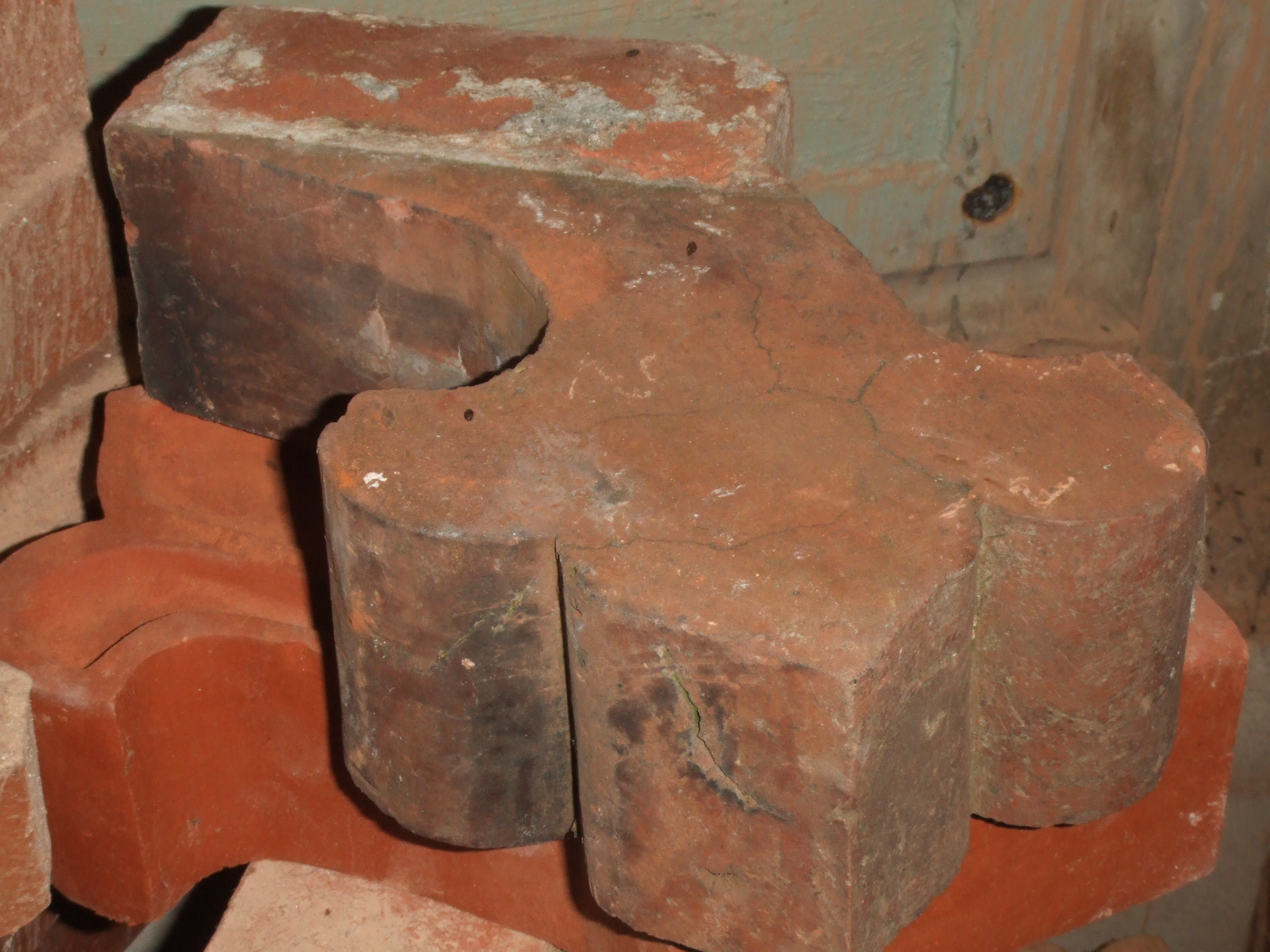 Formstein, St. Bartholomäuskirche Demmin